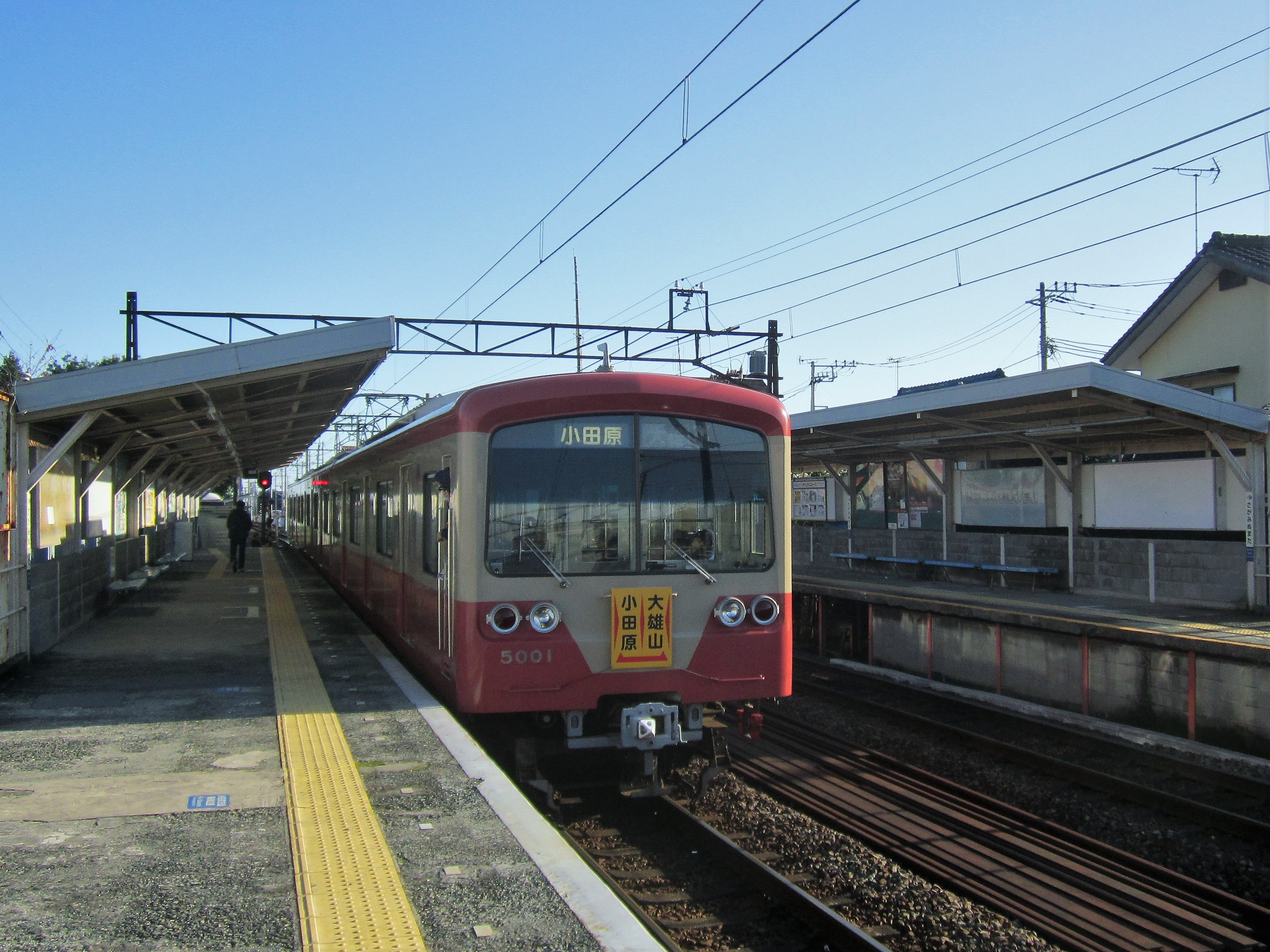 相模沼田駅に停車中の伊豆箱根鉄道5000系5001